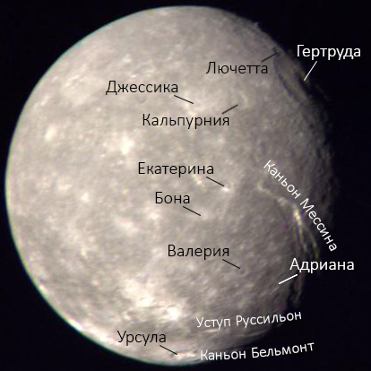 Фотография Титании, спутника Урана, с обозначенными на нём кратерами, уступами и каньонами.